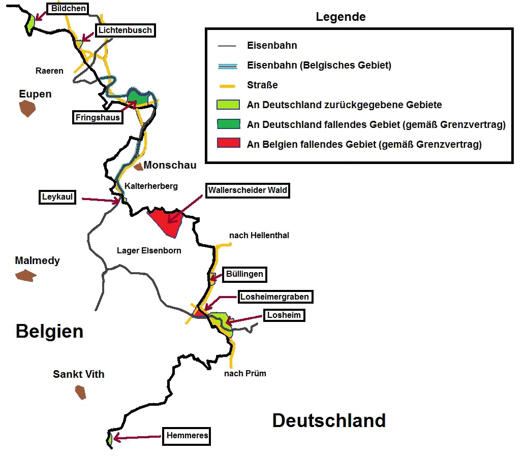 Grenzänderungen Deutschland Belgien